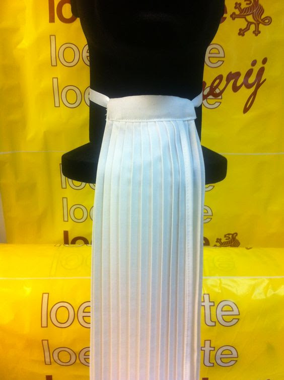 advocaten befje